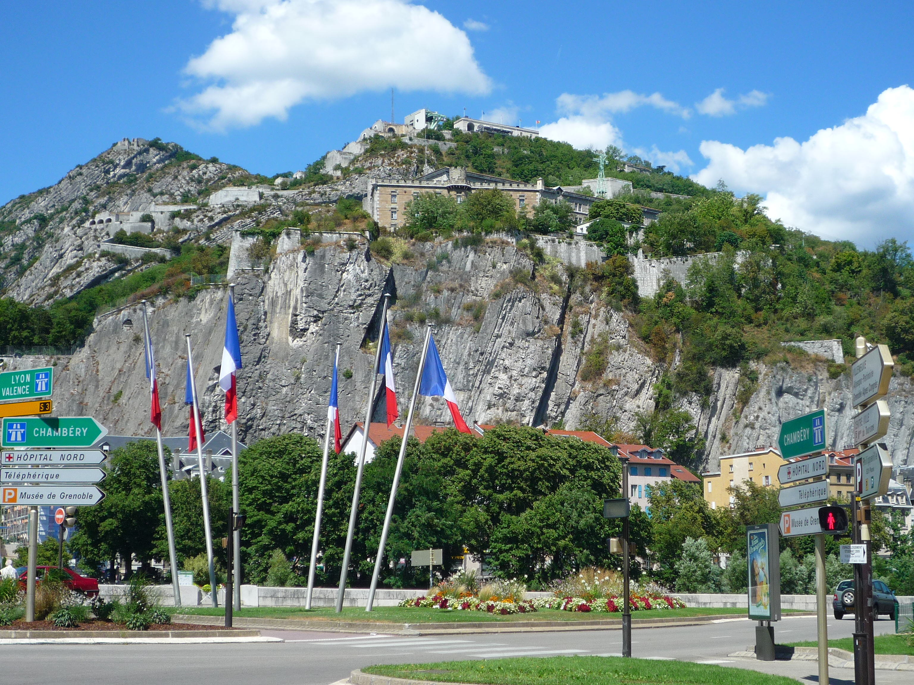 Fort Barot et au-dessus le Fort de la Bastille - Grenoble, France